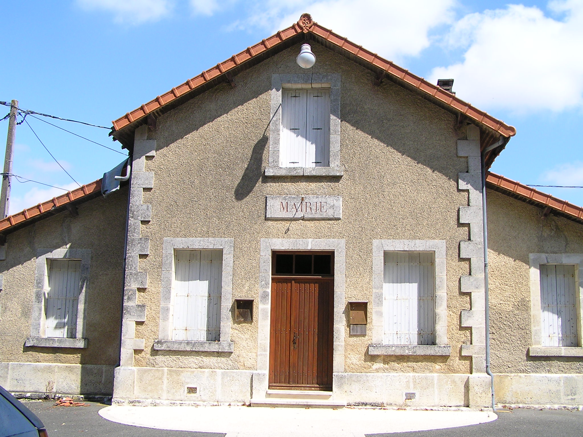 mairie d'Auge-Saint-Médard